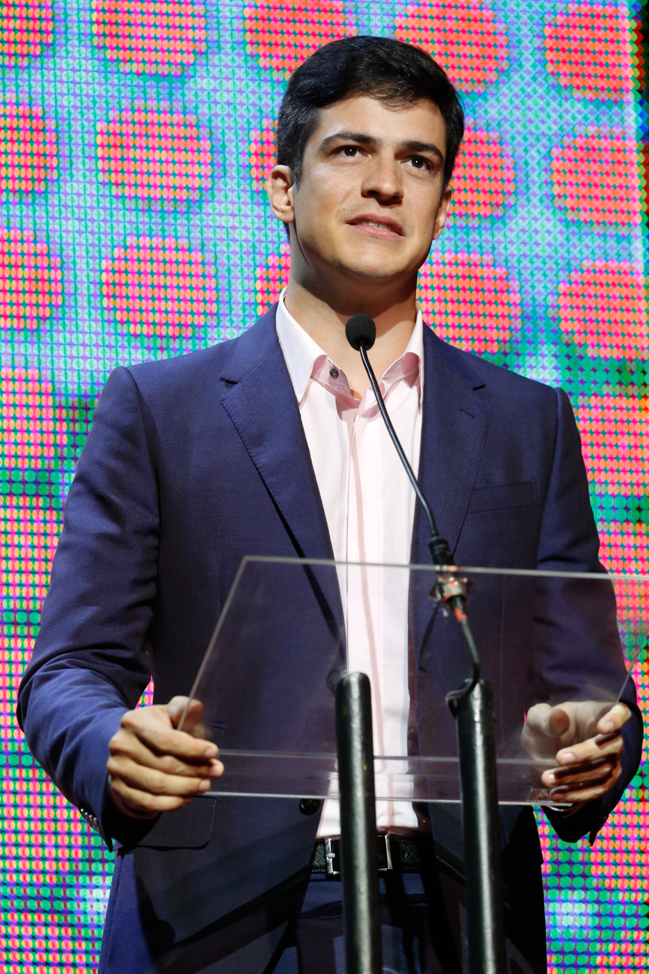 Matheus Solano durante o 25o Premio da Musica Brasileira no Theatro Municipal. Foto: Roberto Filho (14/05/14)